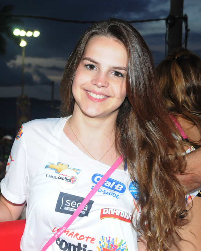 Bianca Salgueiro